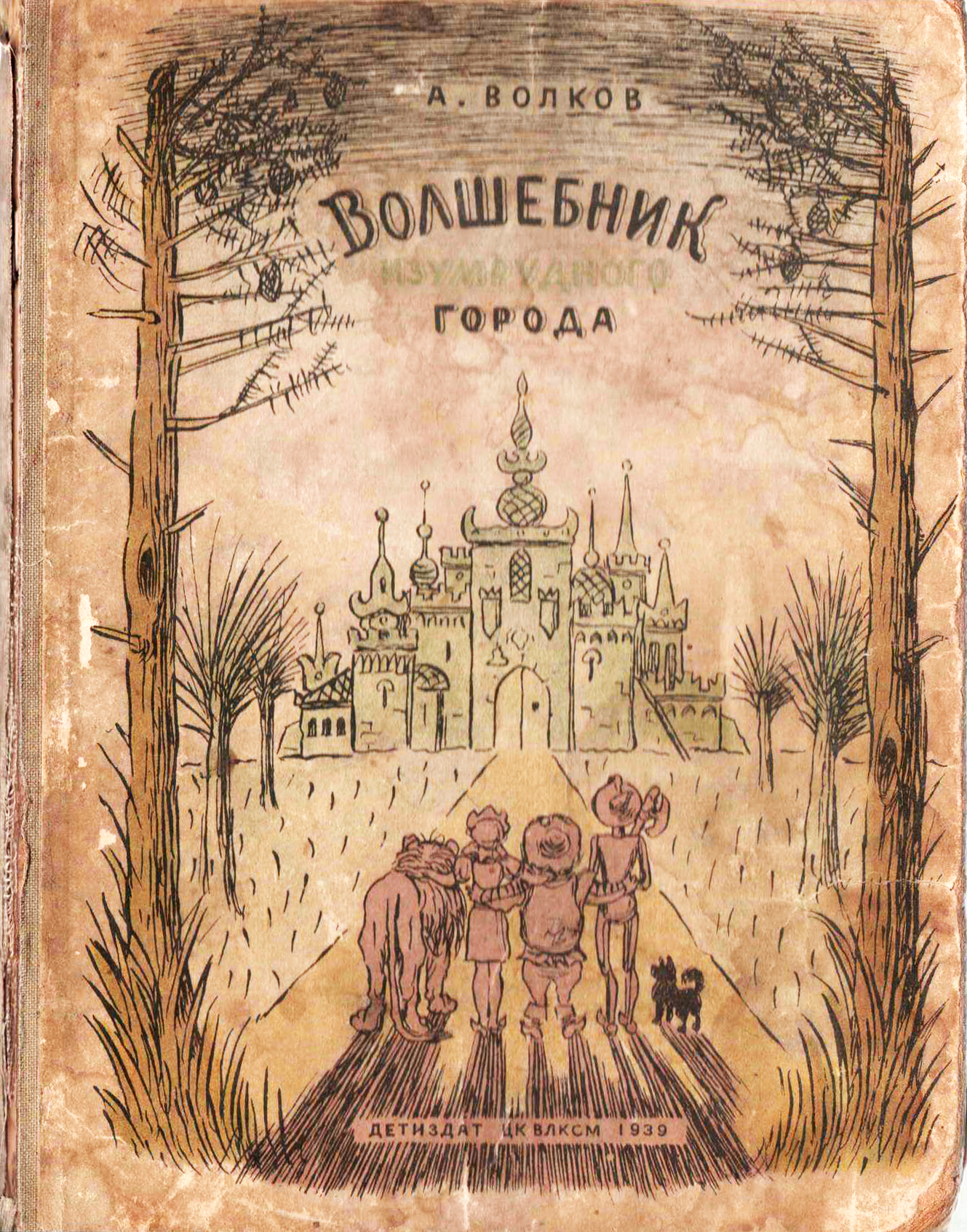 Обложка первого издания повести «Волшебник Изумрудного города»